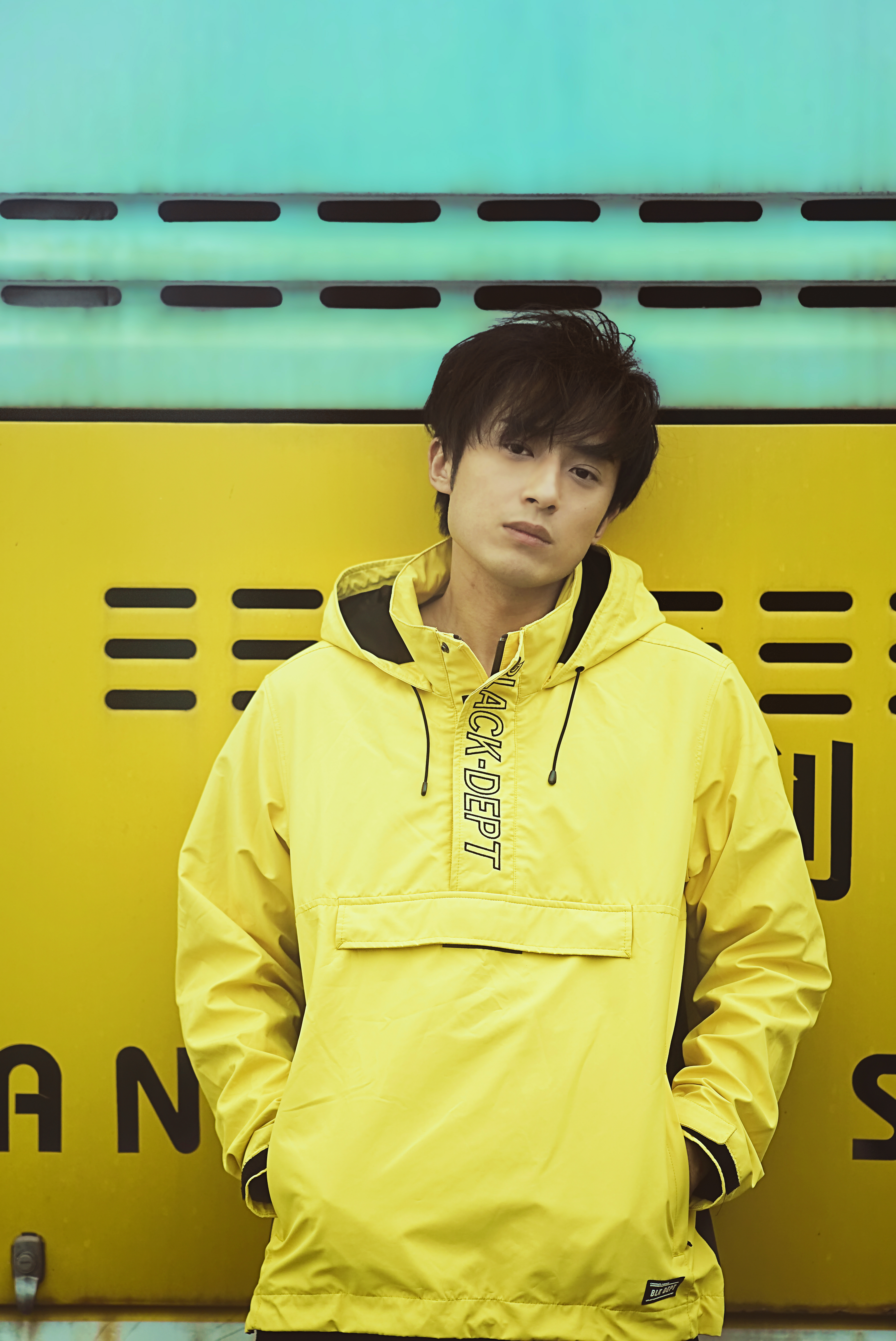 粵語: Kyle Li profile photo